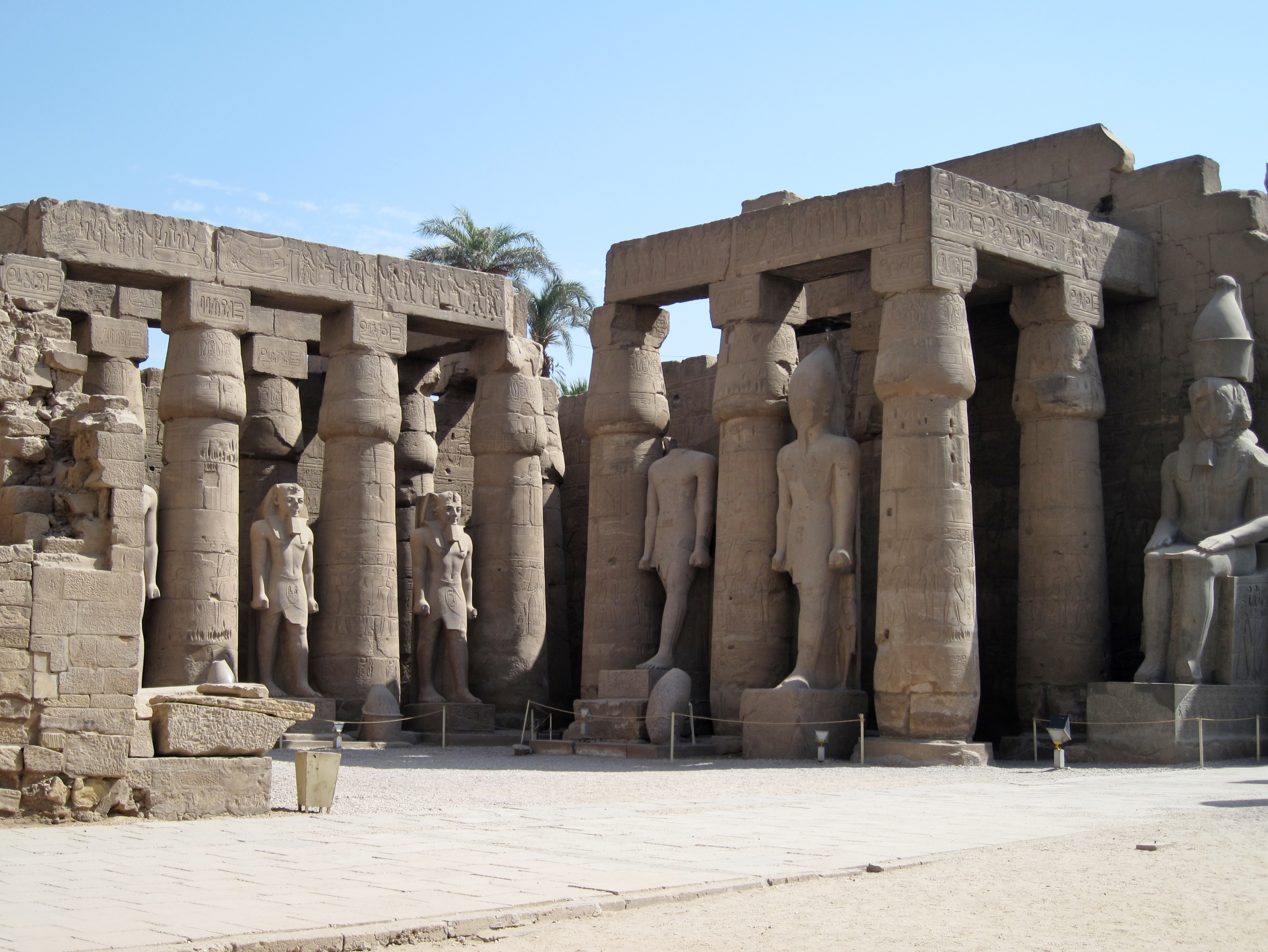 Im Inneren des Tempels von Luxor, Ägypten